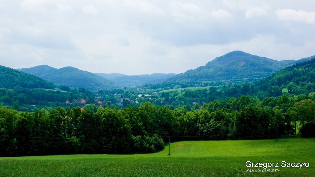 Wojcieszów dnia 31 maja 2017 roku, koło godziny 11:00. Panorama Gminy Wojcieszów.